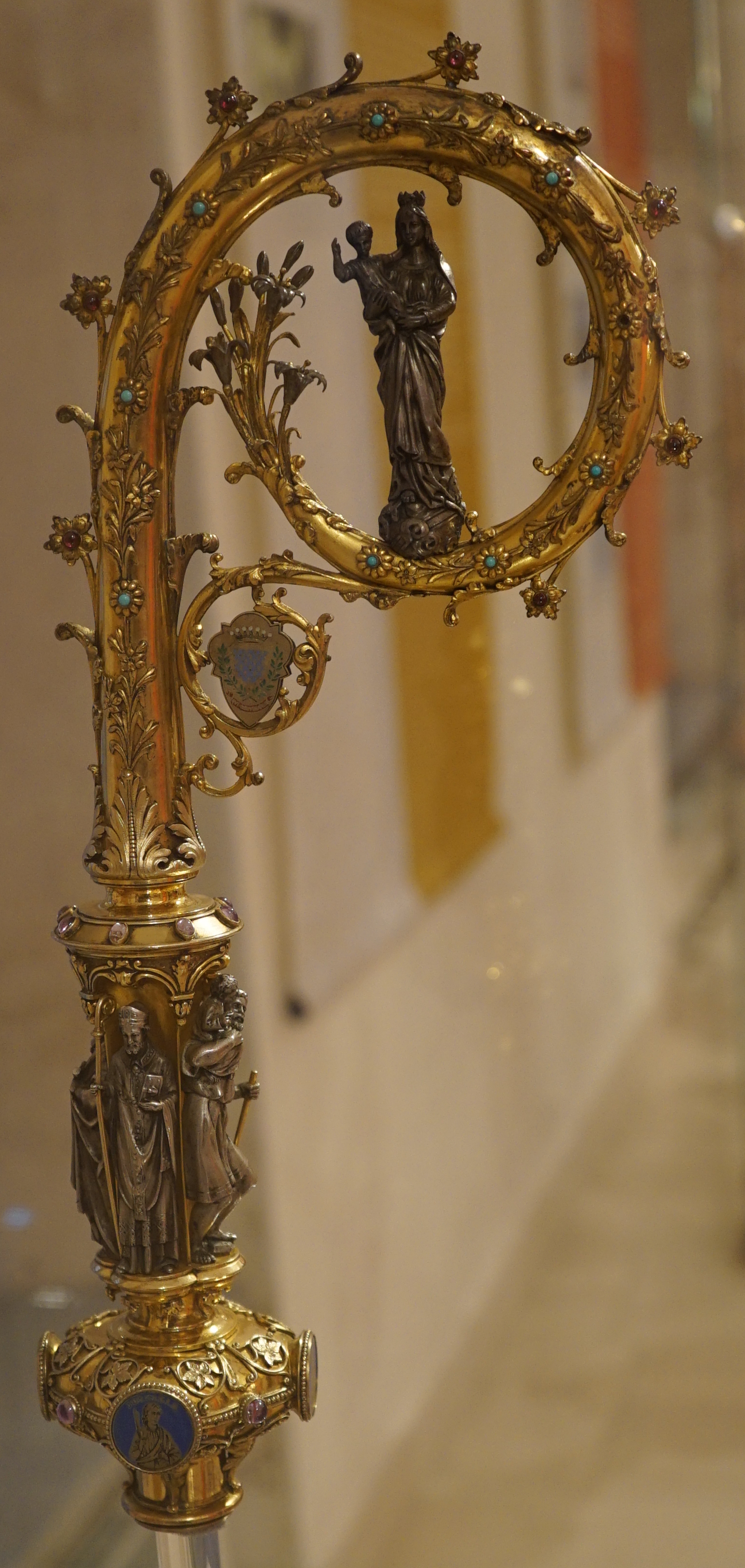 crosse dite de Mgr Enard, réalisée au XIXe par Placide poussielgue rusand, présenté au musée d'art sacré provenant de l'église de COmmercy.